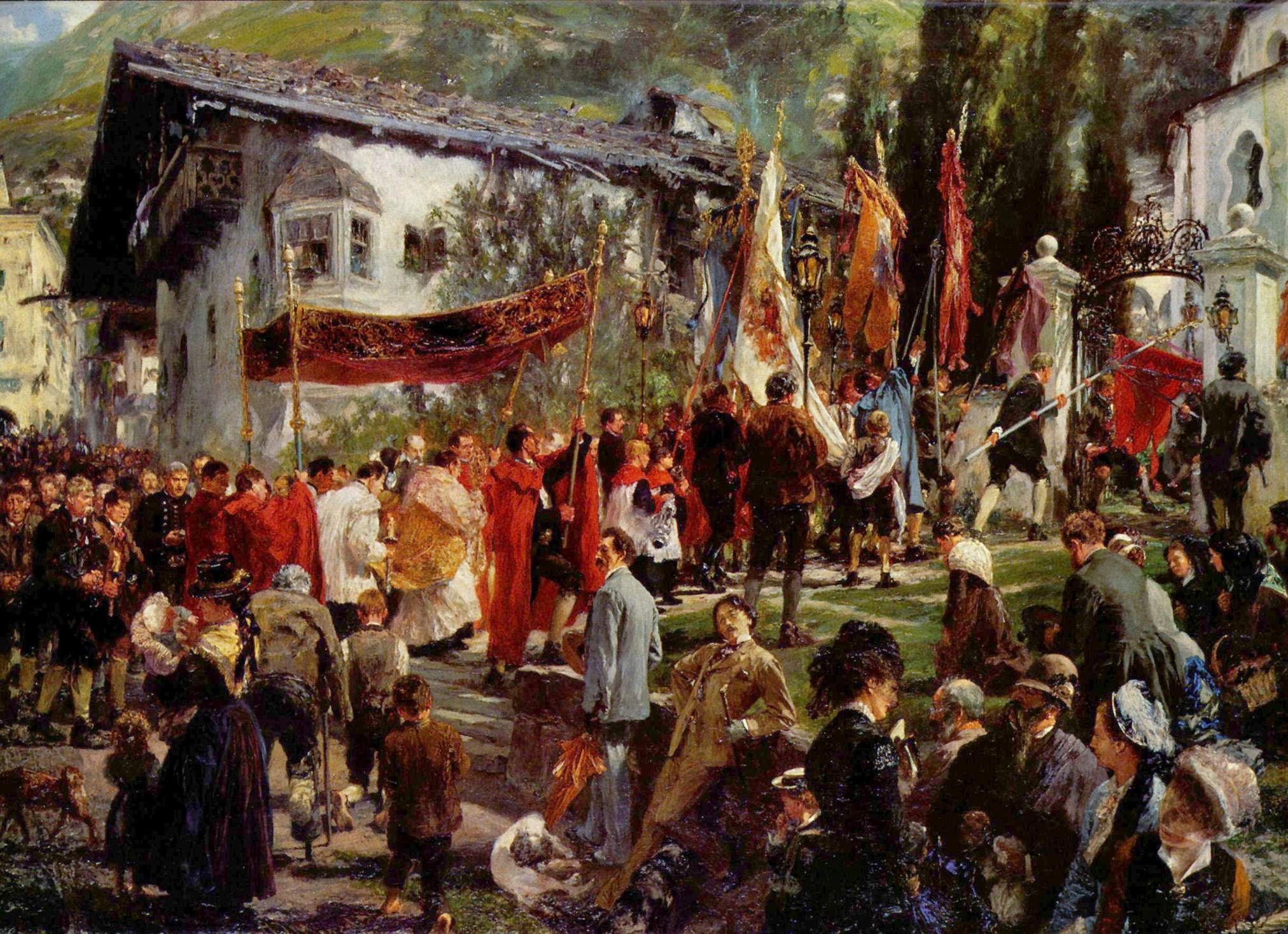 Bei diesem religiösen Brauchtum treffen zwei soziale Gruppen hart aufeinander. Die mit der Kirche verbundene bäuerliche ortsansässige Bevölkerung und daneben die schaulustigen, sich um das Ereignis tummelnden ignoranten städtischen Kurgäste.